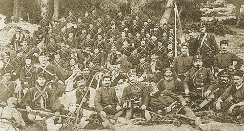 Четата на Йоанис Дафотис